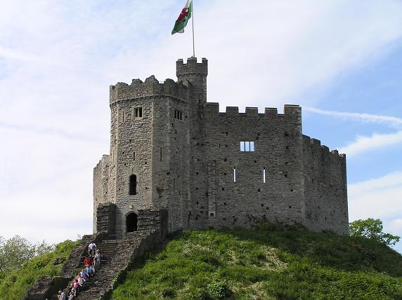 Foto del fuerte normando del Castillo de Cardiff. La tome en mayo de 2005, y puede ser usada libremente.